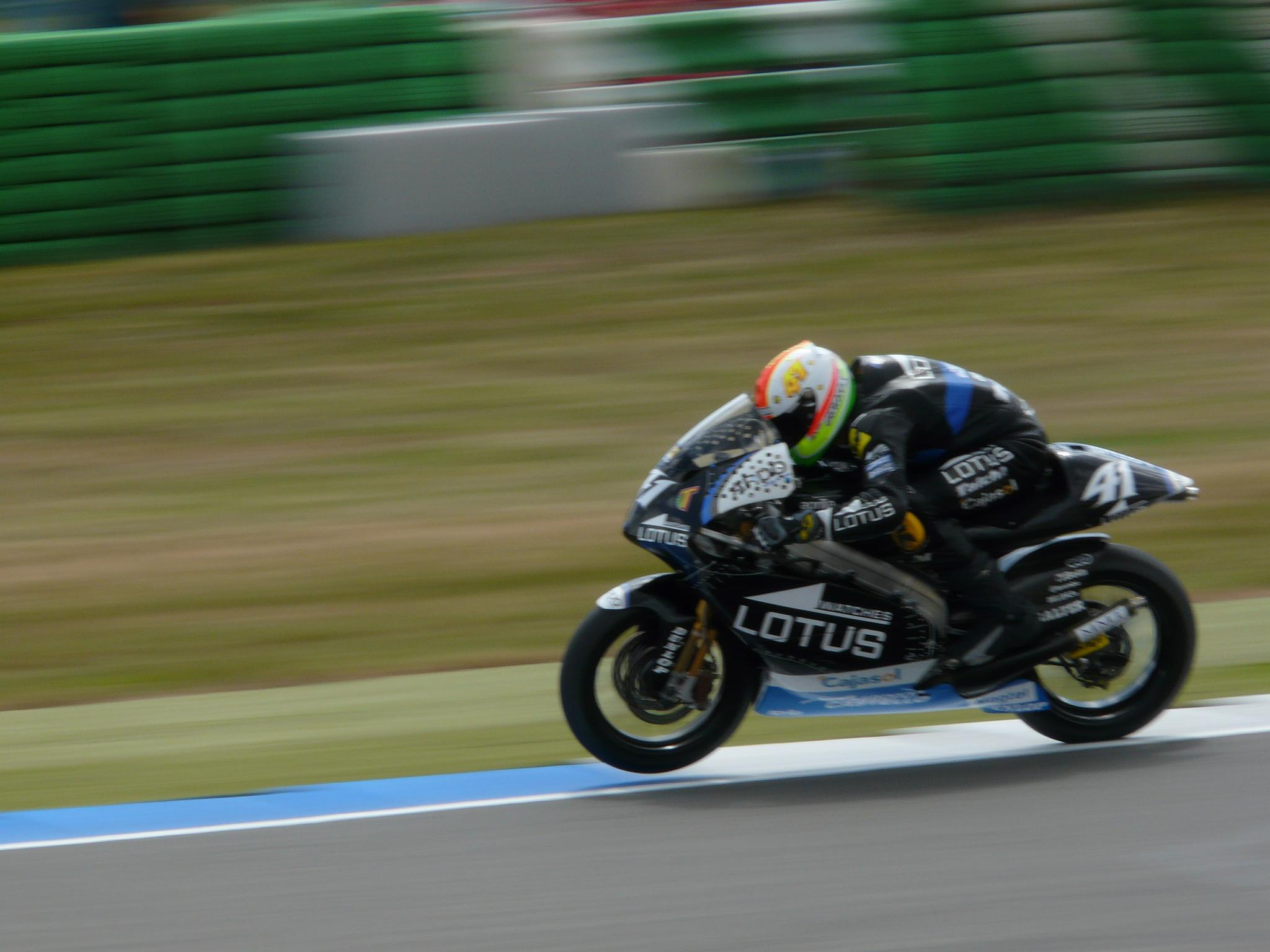 Aleix Espargaro